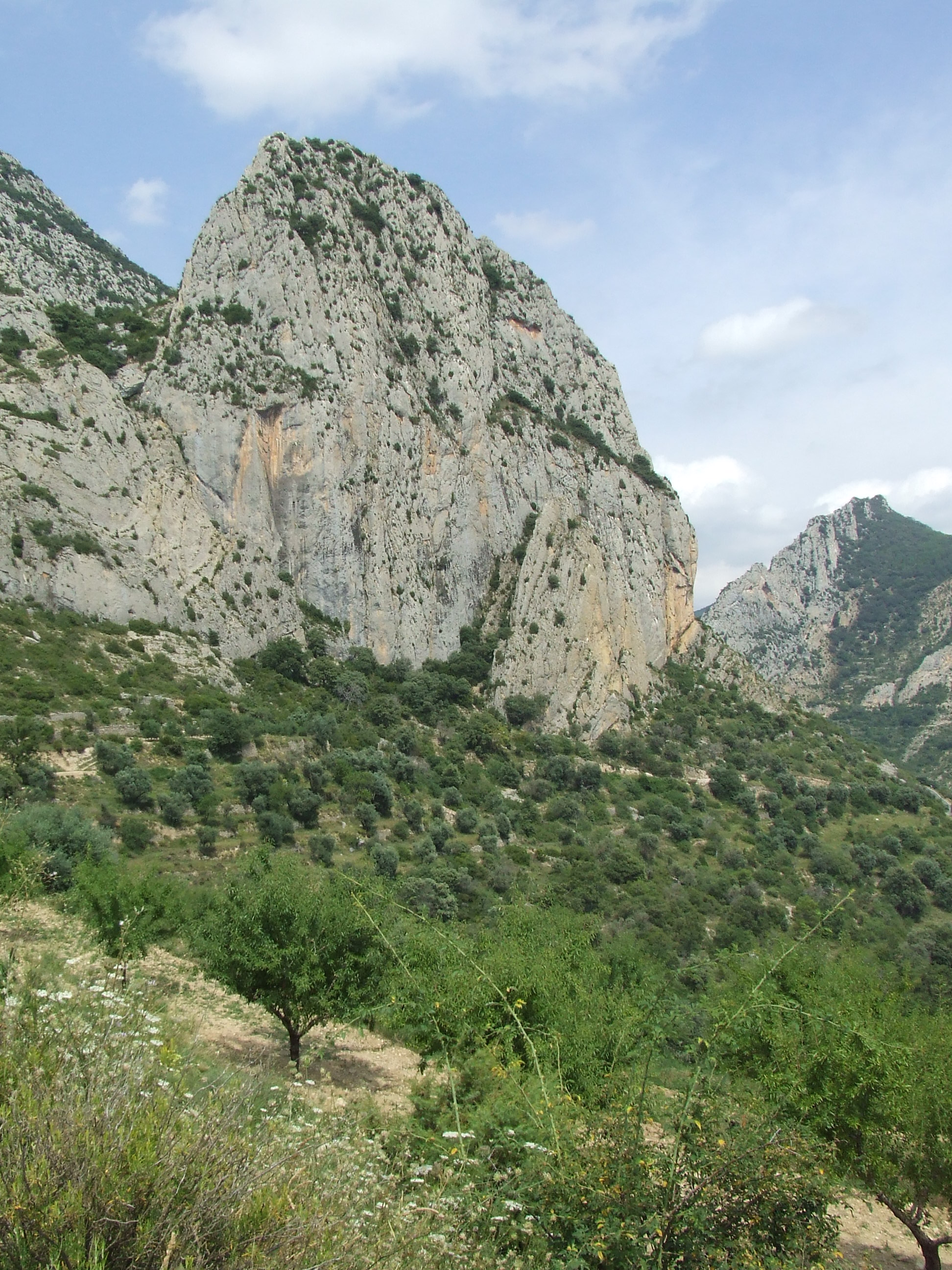 Roca de Magaró i Magaró (Abella de la Conca, Pallars Jussà)